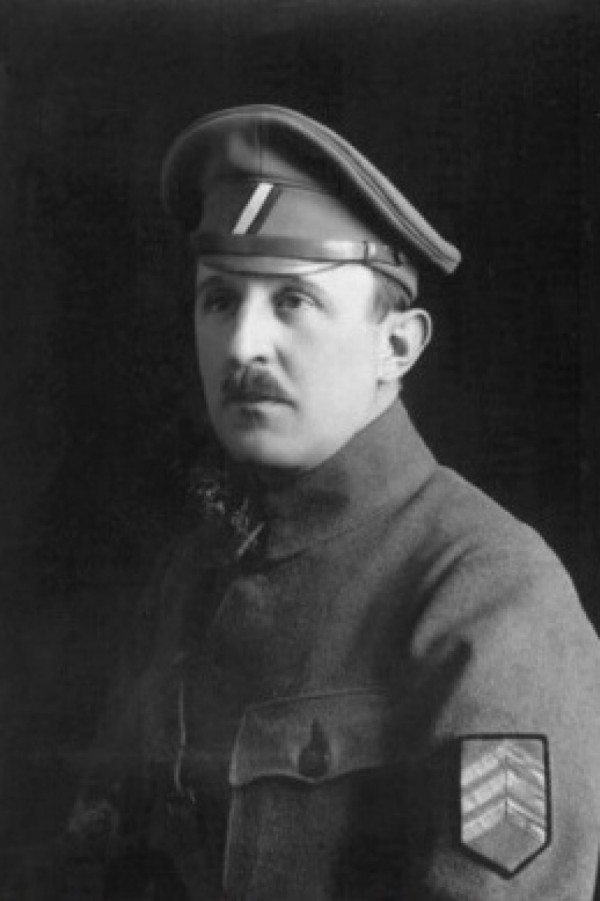 Vladimír Haering, jako plukovník zdravotnictva Čsl. vojska v Rusku (kol.1919)